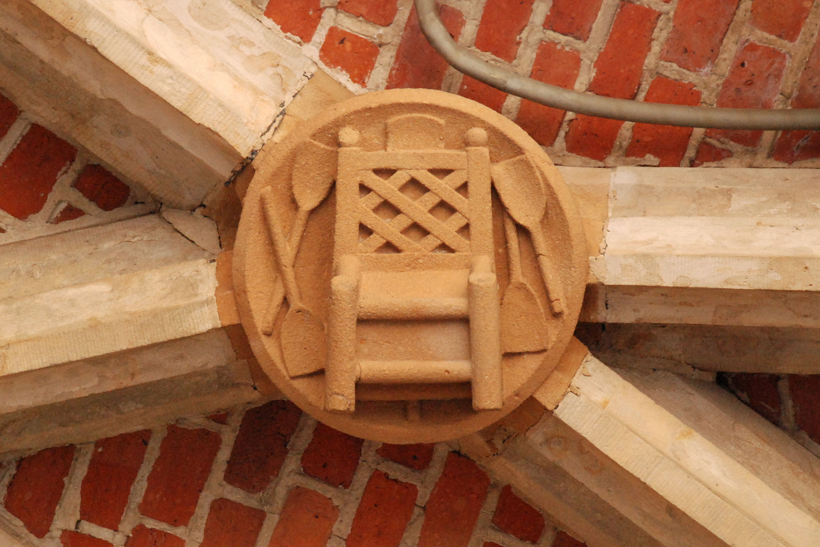 Belgique - Bruxelles - Grand-Place - Hôtel de Ville - Maison de l'Estrapade (Scupstoel)